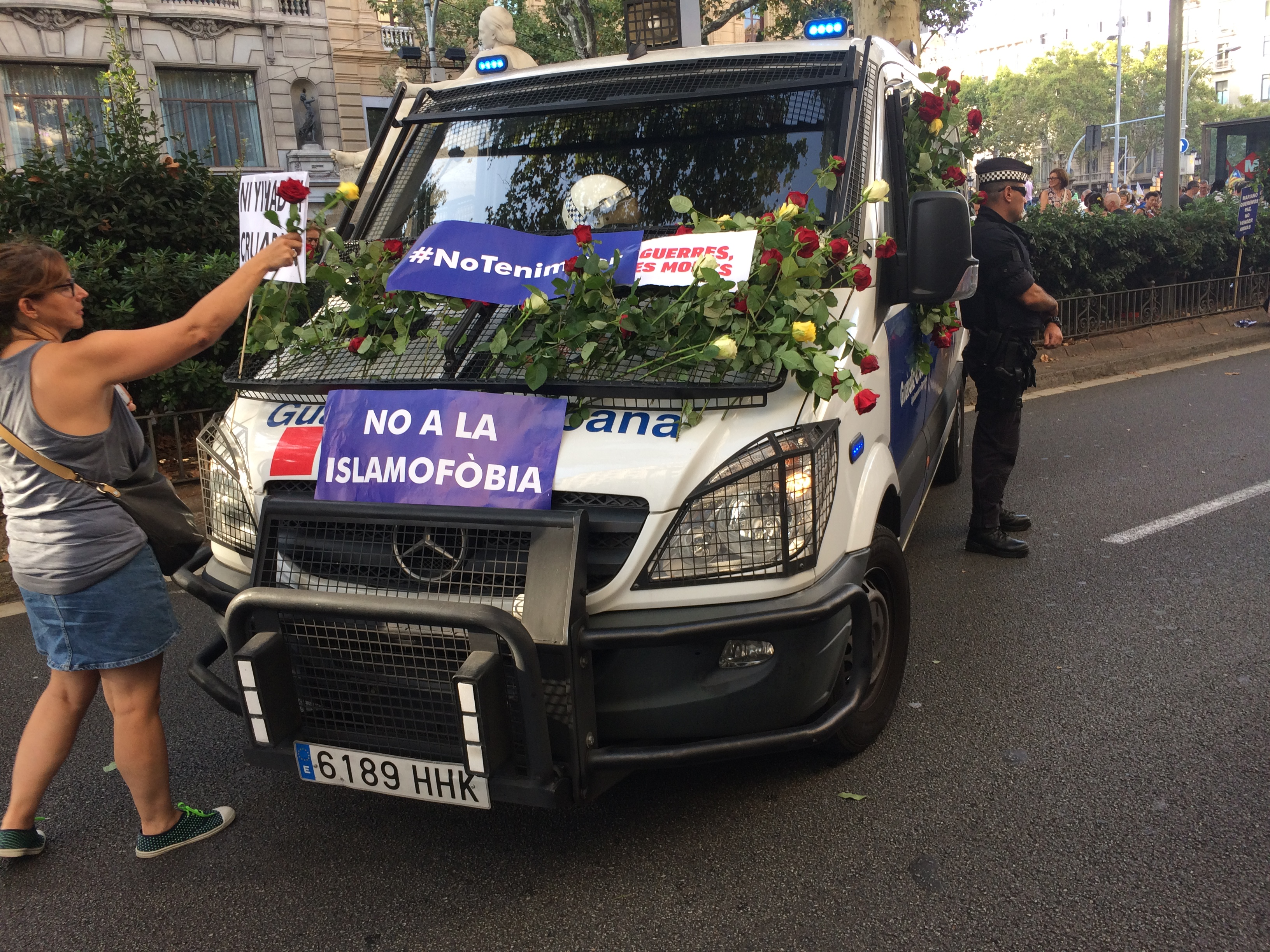 Homenaje a la guardia urbana de Barcelona